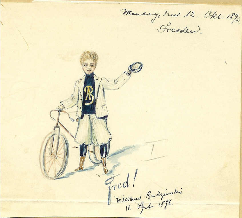 Fredy Budzinski, gezeichnet von seinem Bruder William Budzinski, im Jahre 1896